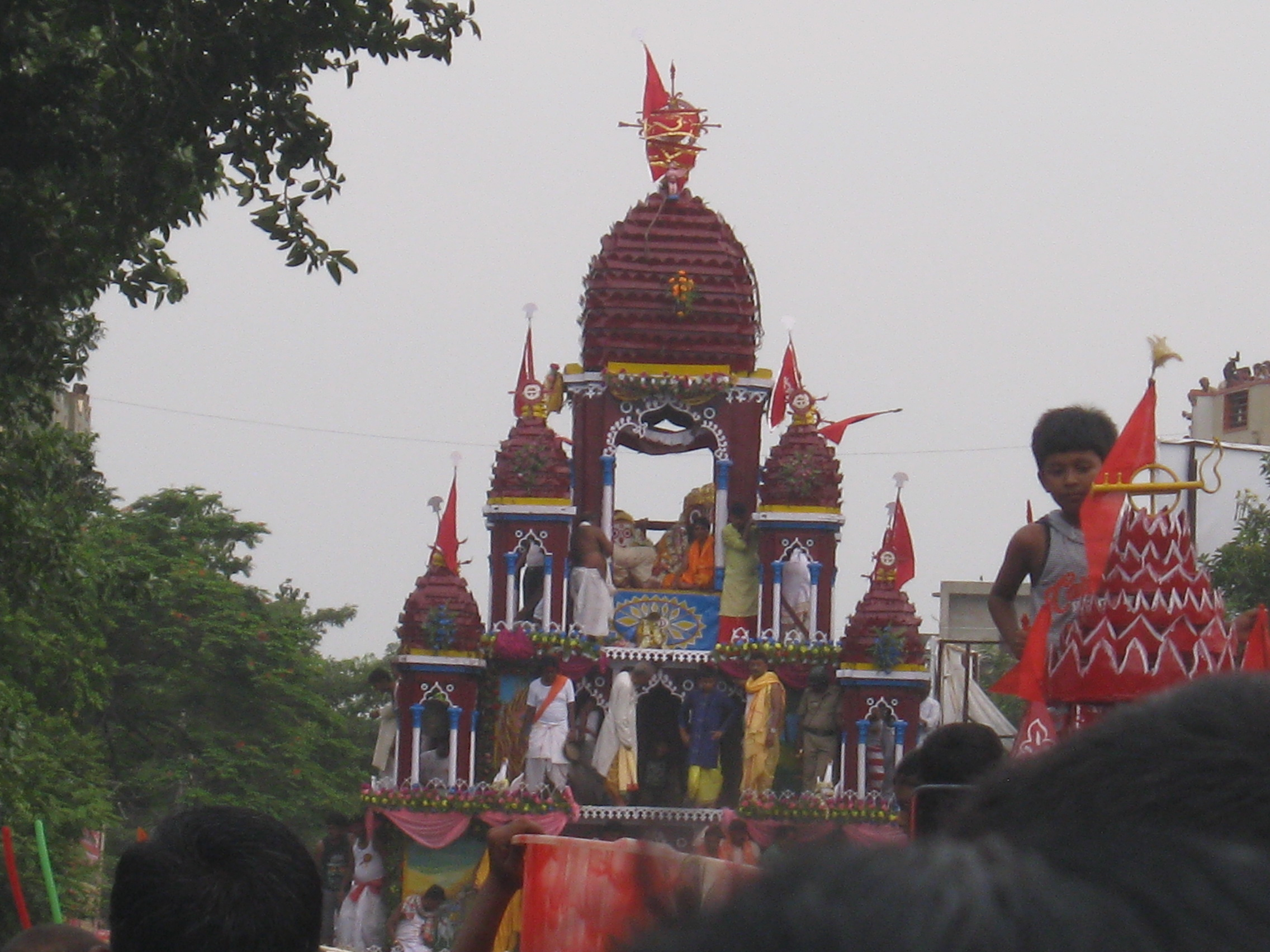 Mahesh Rath, Serampore